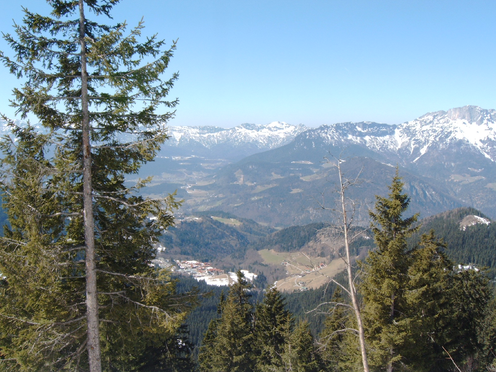 Blick vom Rossfeld Richtung Untersberg in Berchtesgaden.